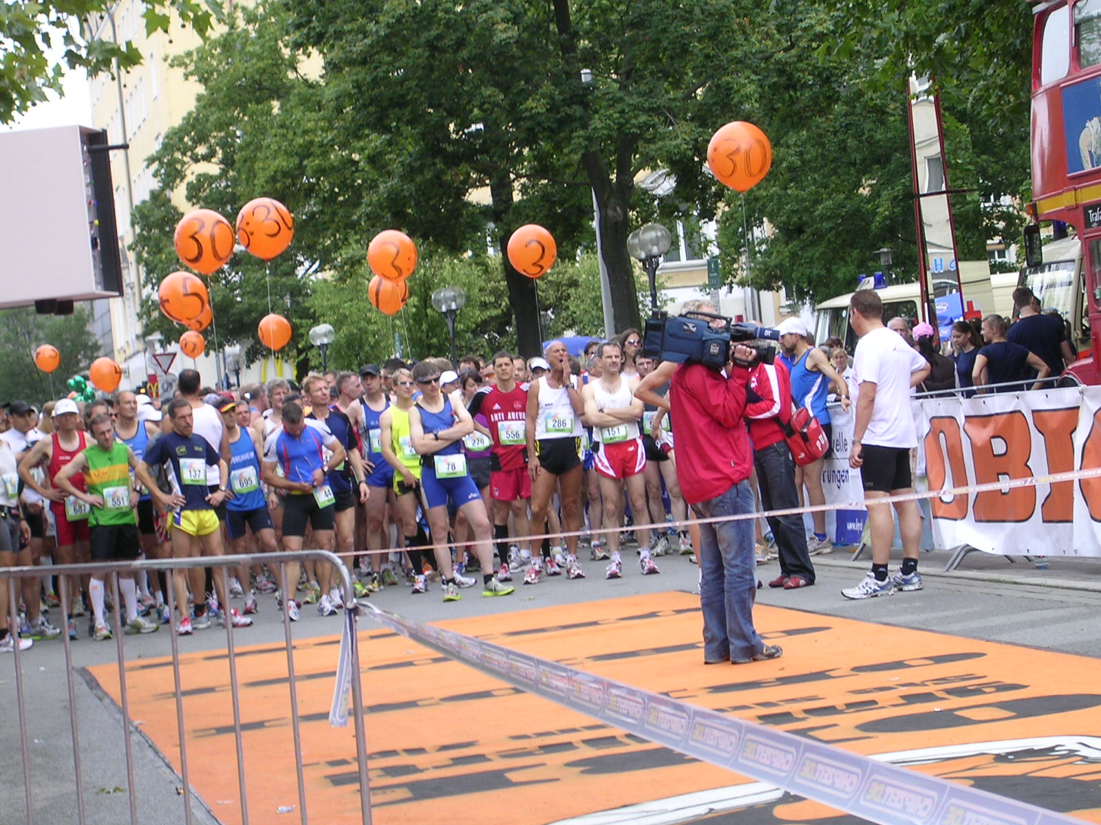 Starterfeld auf der Fürther Freiheit kurz vor Beginn des Metropolmarathons 2009.